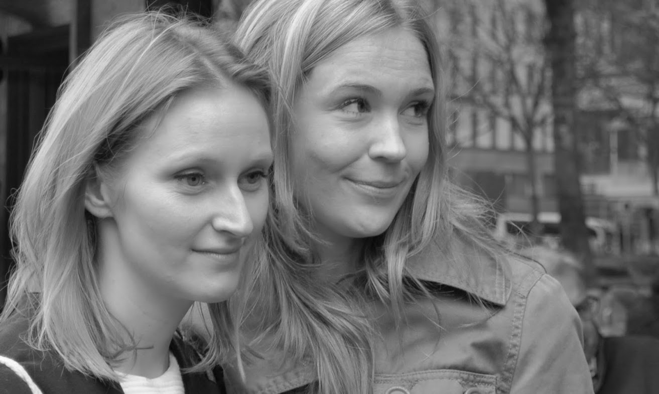 Veras Mantel - Teampremiere - Astor Filmlounge Berlin, Kurfürstendamm